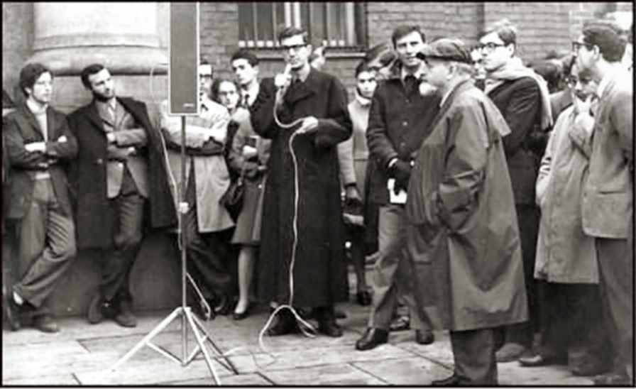 Comizio di Mario Capanna all'ingresso dell'Università Cattolica di Milano nel 1967. In primo piano, il rettore dell'epoca, Ezio Franceschini.